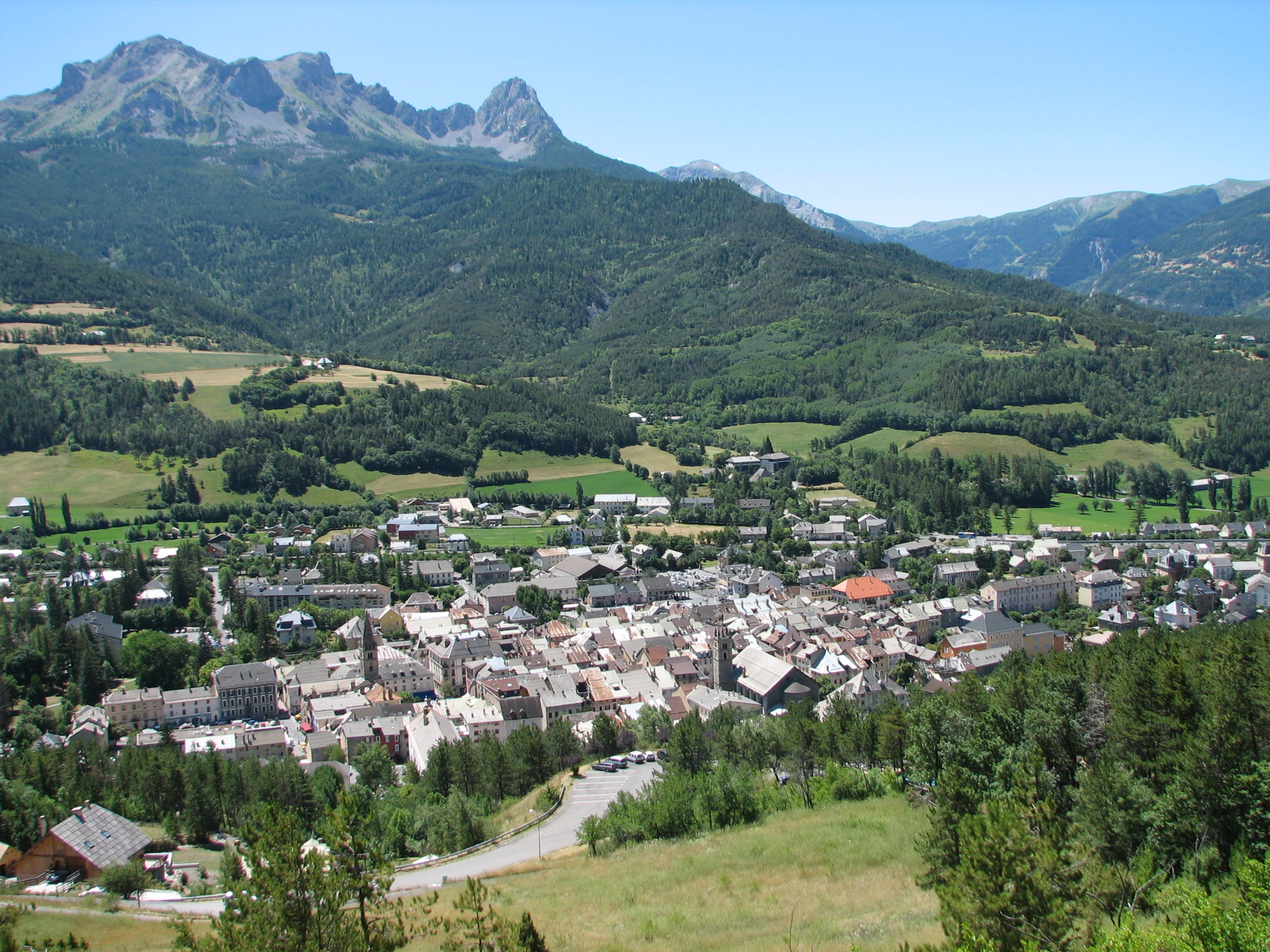 Panorama de Barcelonnette en été